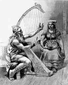 PD från Projekt Runeberg